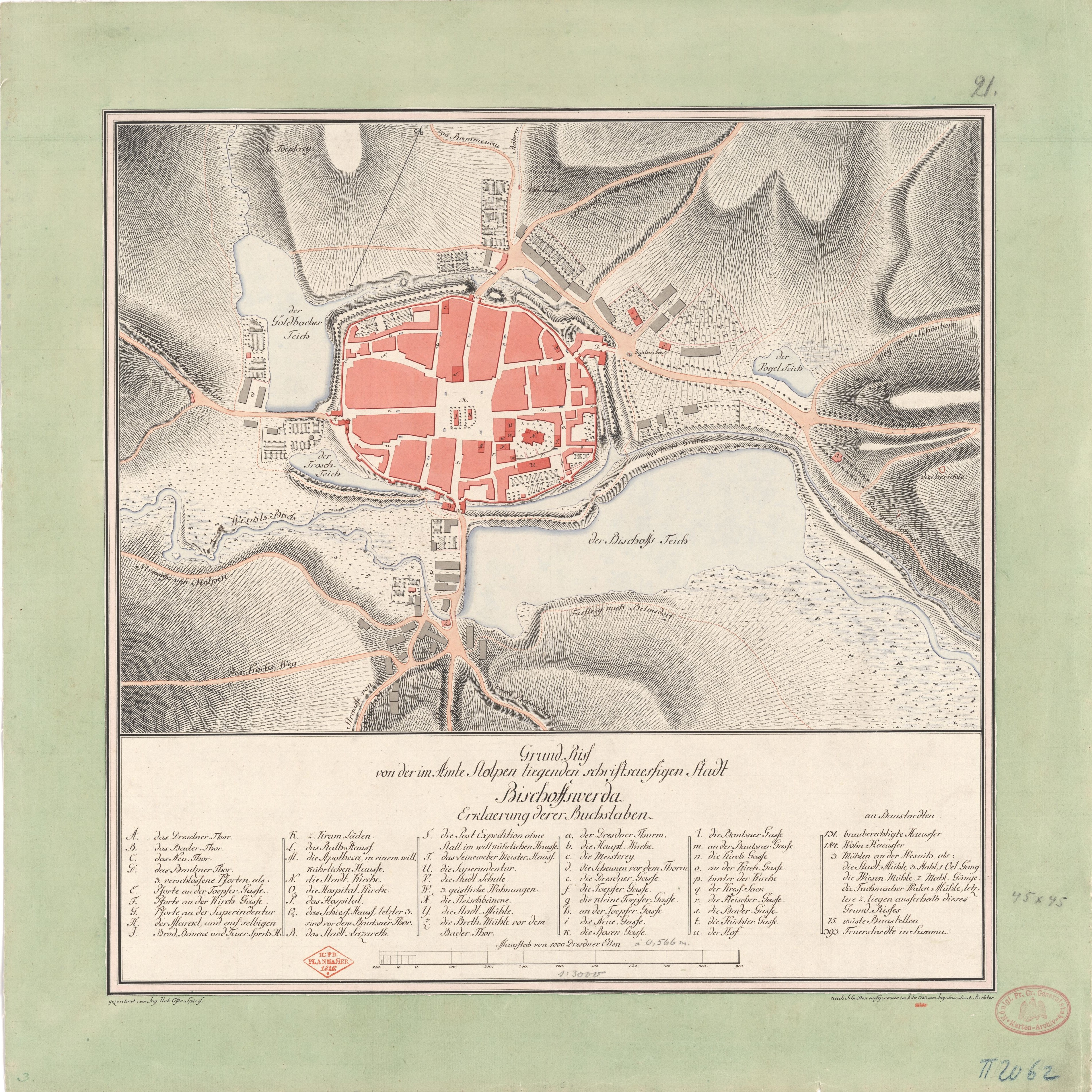 Grundriss der Stadt Bischofswerda, ca. 1:3 000, Handzeichnung, 1793, Grund-Riß von der im Amte Stolpen liegenden schriftsaeßigen Stadt Bischoffswerda / nach Schritten aufgenommen im Jahr 1793 vom Ing. Sous Lieut. Richter. Gezeichnet vom Ing. Unt. Offic. Spieß. - [Ca. 1:3 000]. - [S.l.], 1793. - 1 Kt. : mehrfarb., 45 x 32 cm, 1793